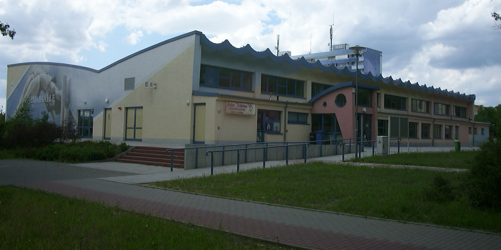 Schwimmhalle in Weißwasser Map: 51° 30′ 0″ N, 14° 38′ 6″ E